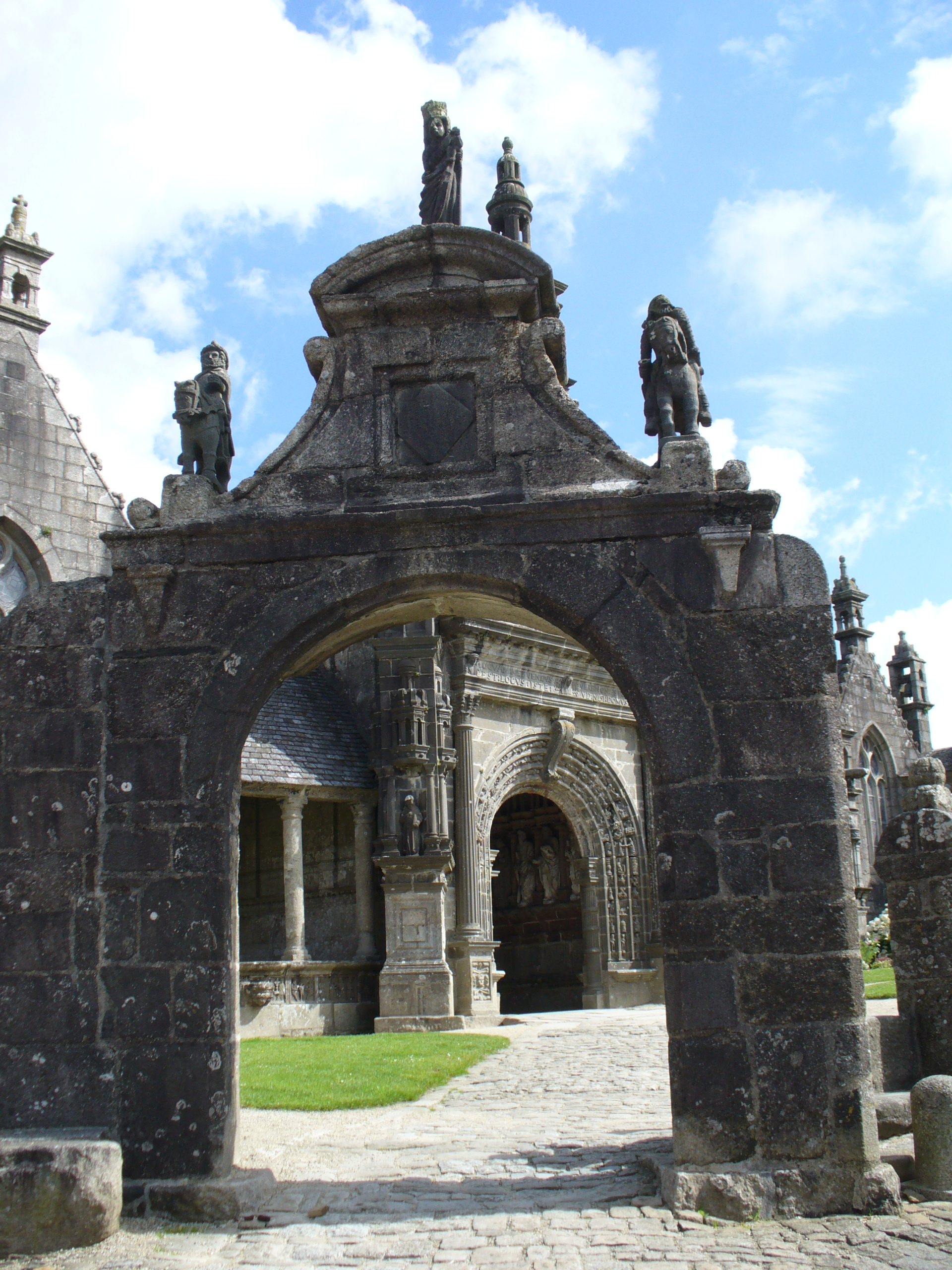 Porte de Triomphe-Triumphpforte(1630)-Enclos Paroissal-Guimiliau